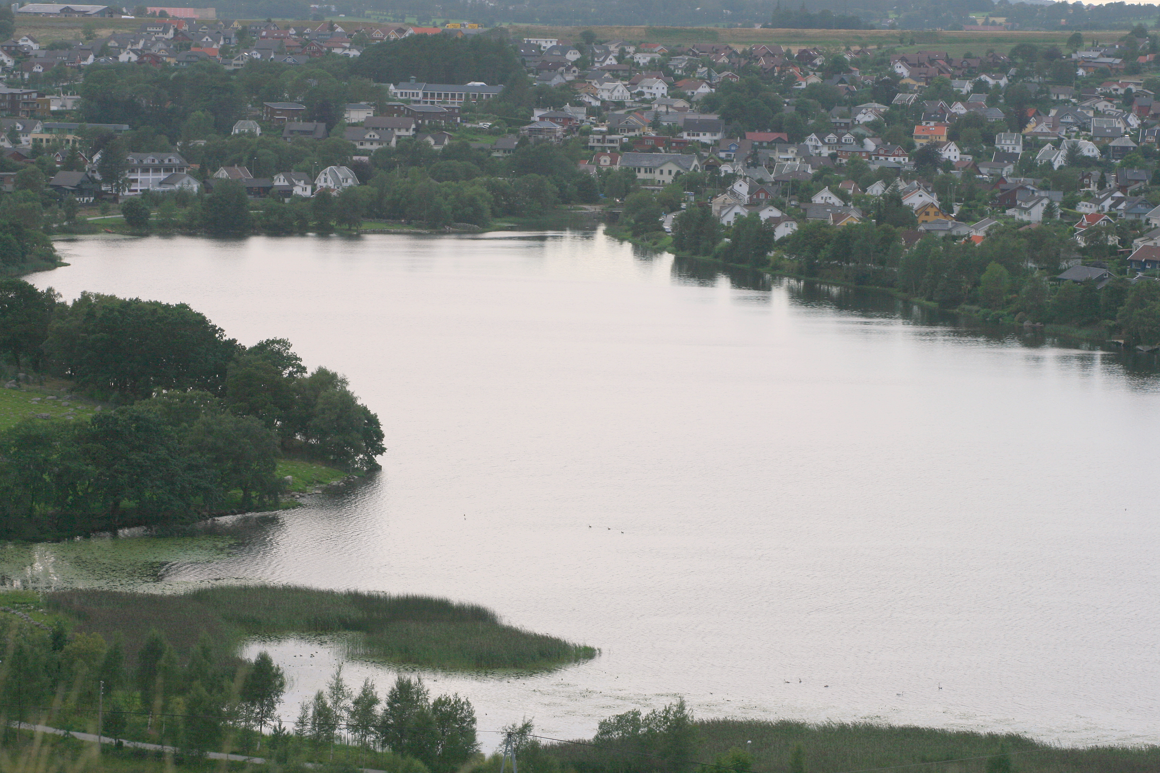 Stokkelandsvannet